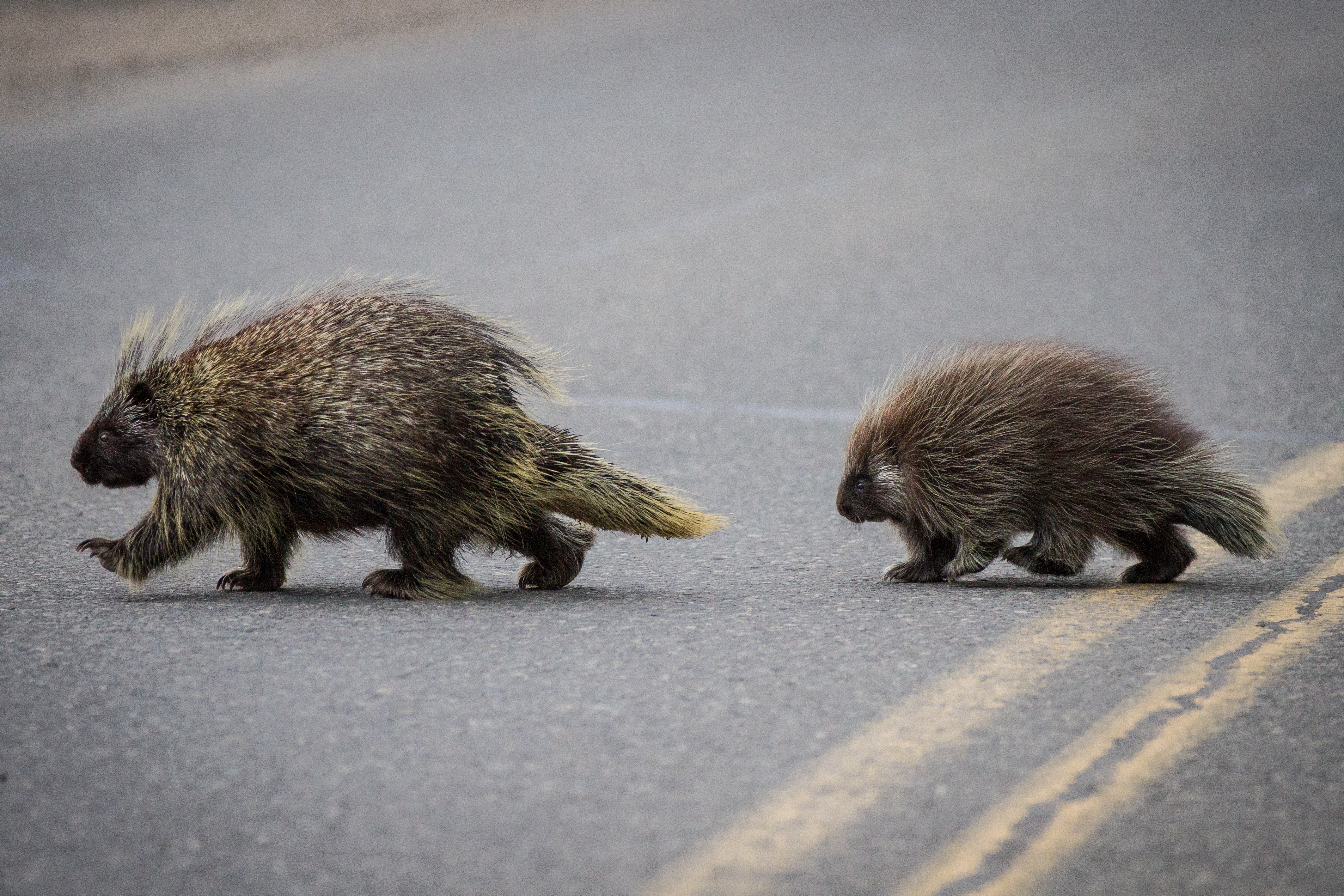 porcupines